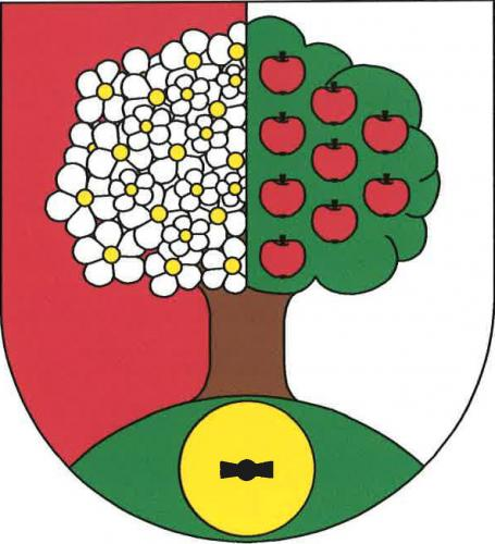 znak, Jablonná, okres příbram